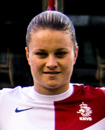 StampMedia